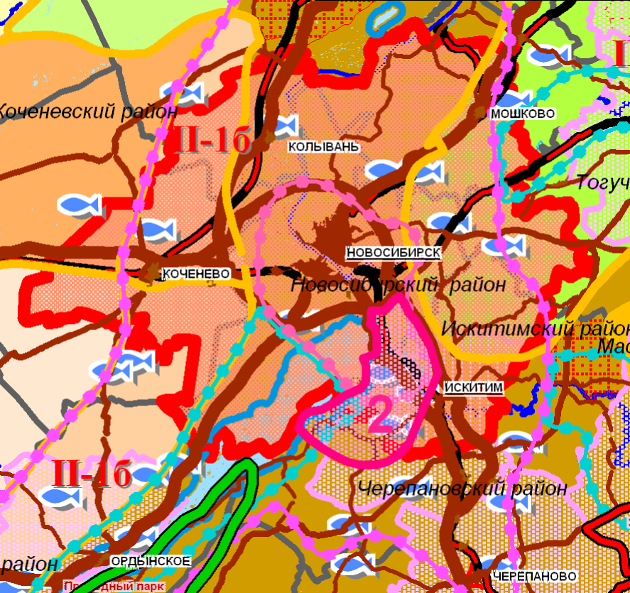 Схема территориального планирования Новосибирской области. Планировочная структура. Выделена в отдельный файл Новосибирская агломерация